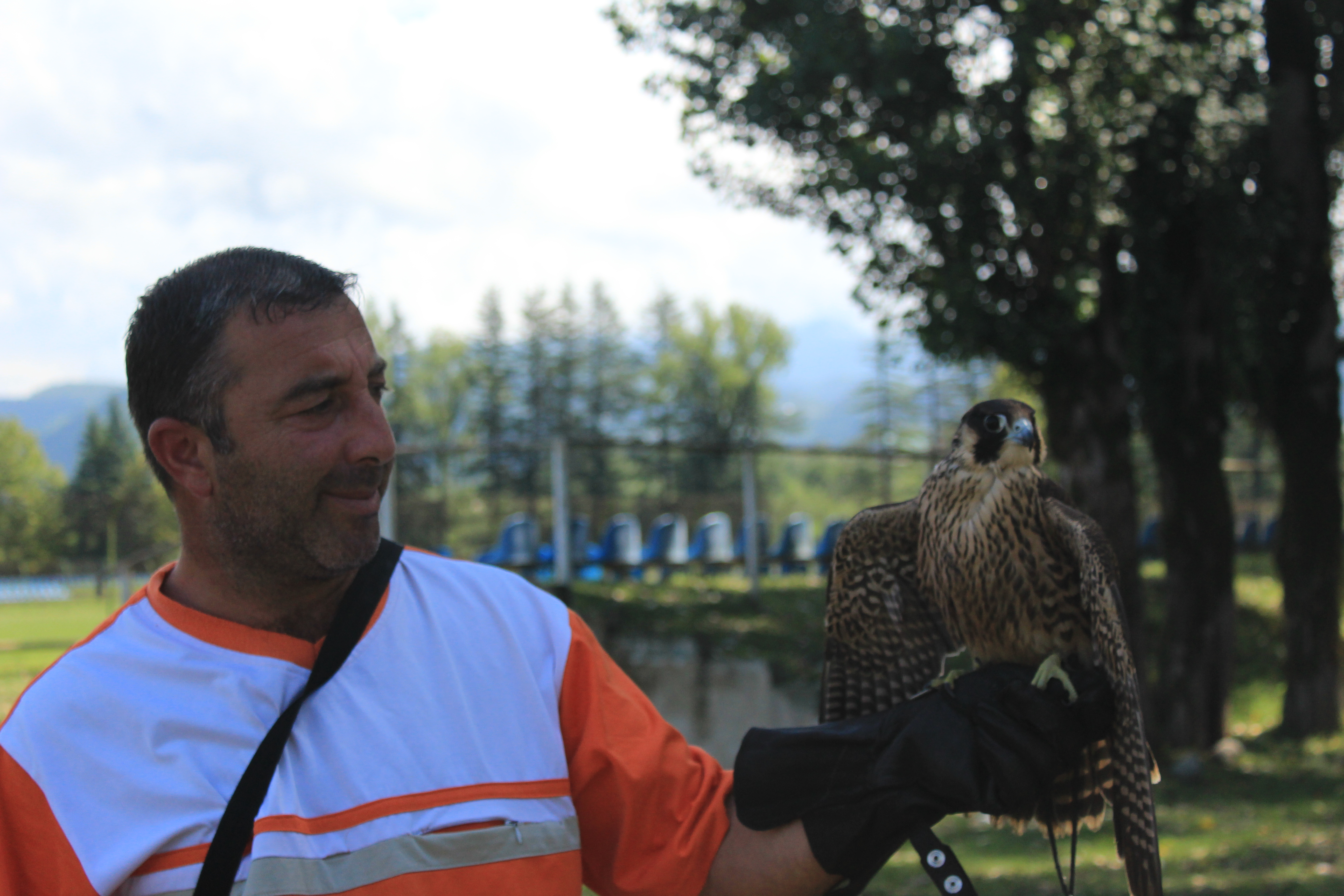 ბაზიერი შევარდენთან ერთად. ჩოხატაური, გურია